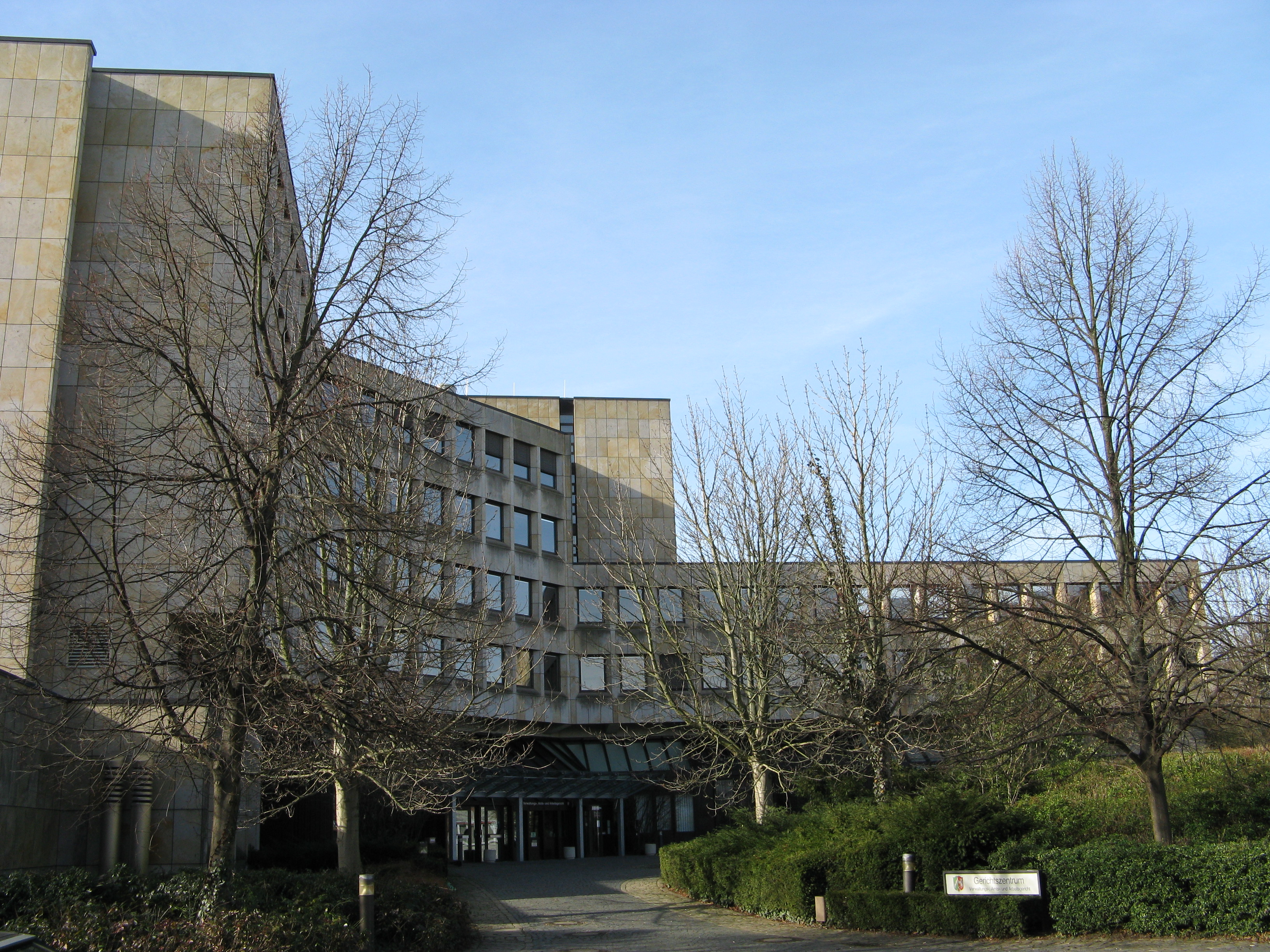 Justizzentrum in Minden, Nordrhein-Westfalen. Sitz des Amtsgerichts Minden und Verwaltungsgerichts Minden.